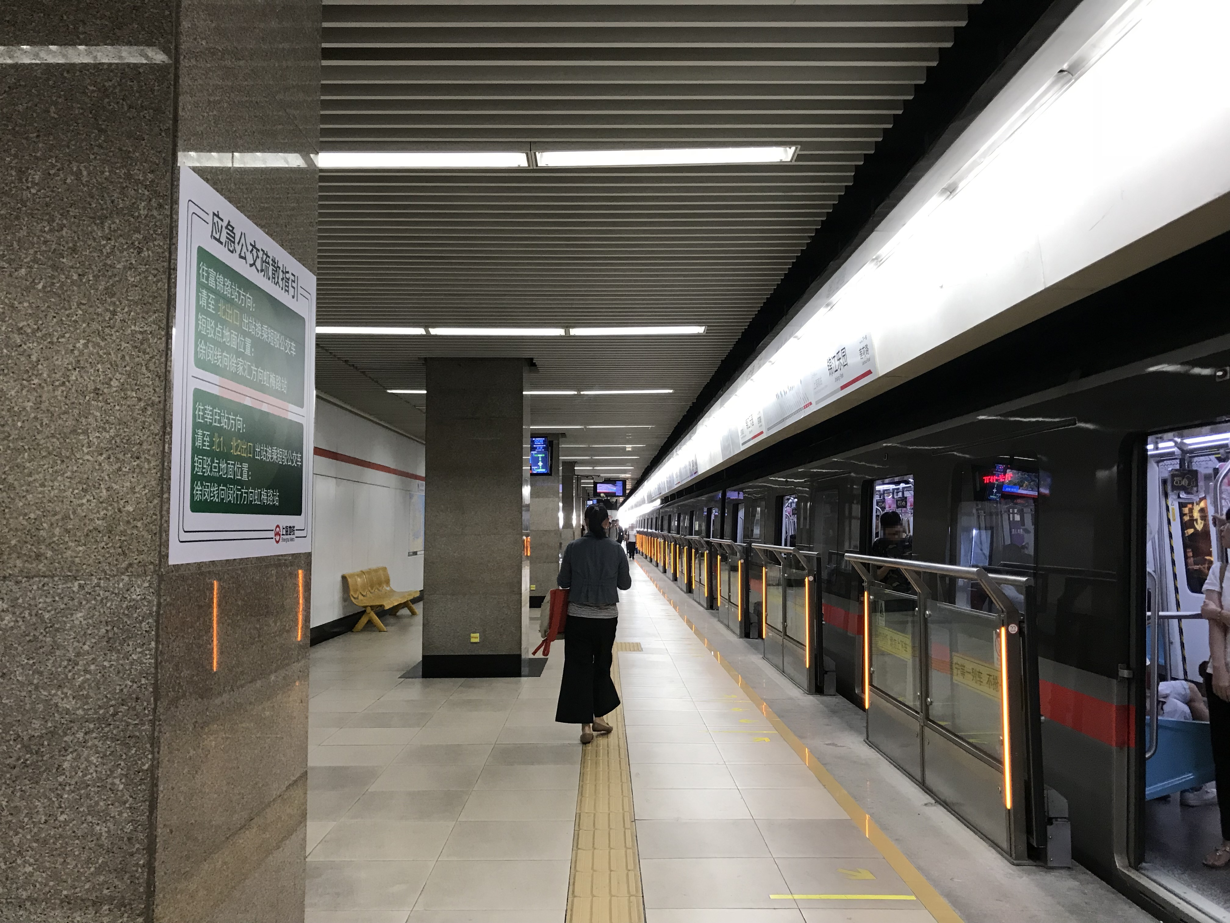 錦江楽園駅のホーム